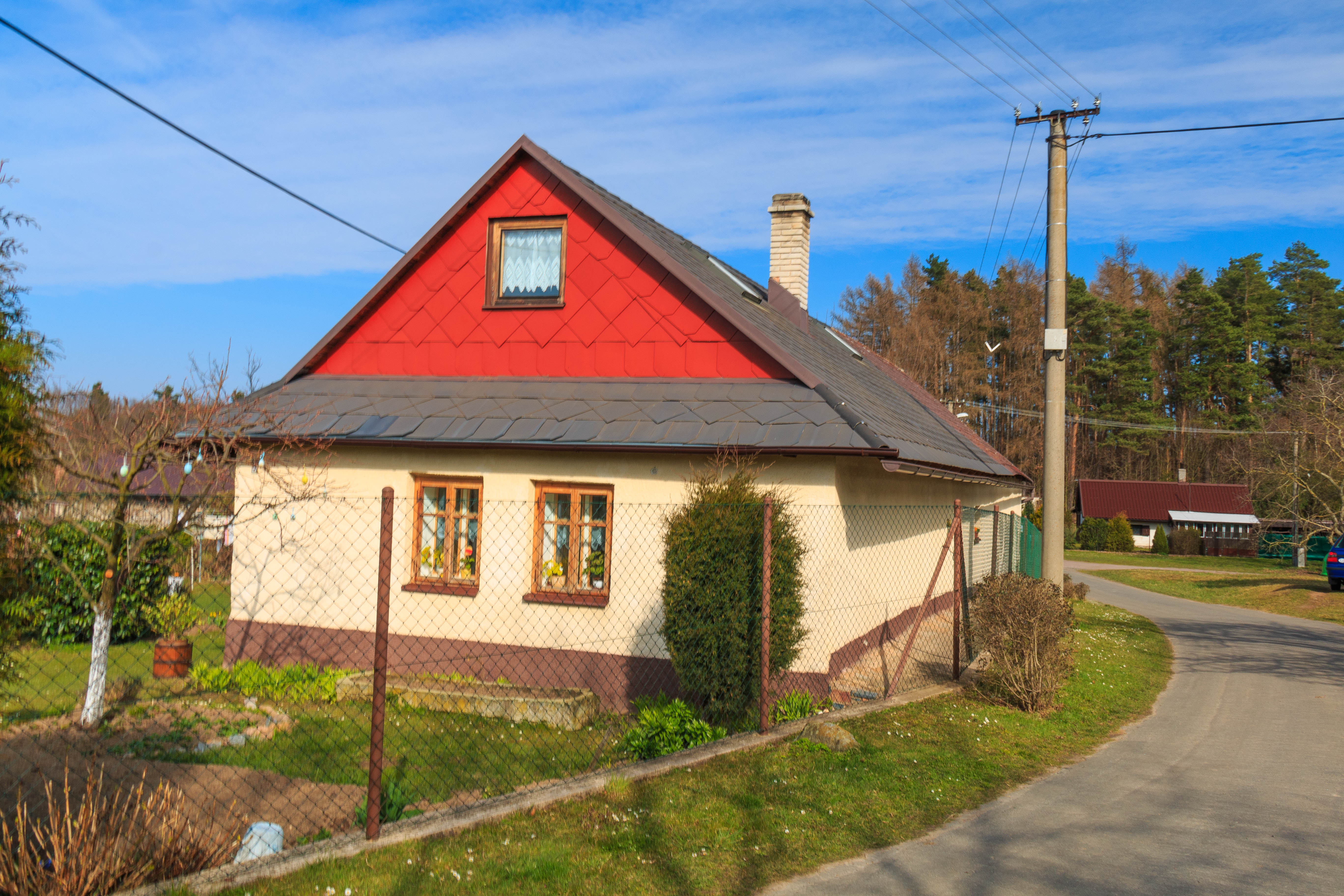 Částkov čp. 9